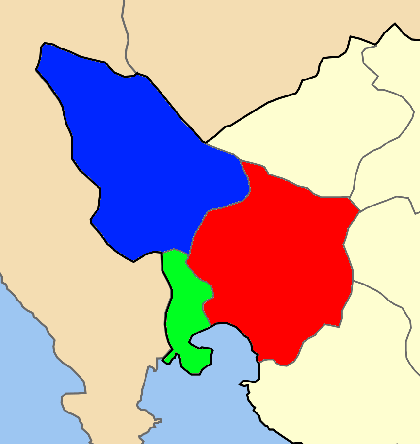 Χάρτης των ενοτήτων (και πρώην δήμων) από τις οποίες αποτελείται ο Δήμος Διστόμου - Αράχοβας - Αντίκυρας. Διστόμου Αράχοβας Αντίκυρας